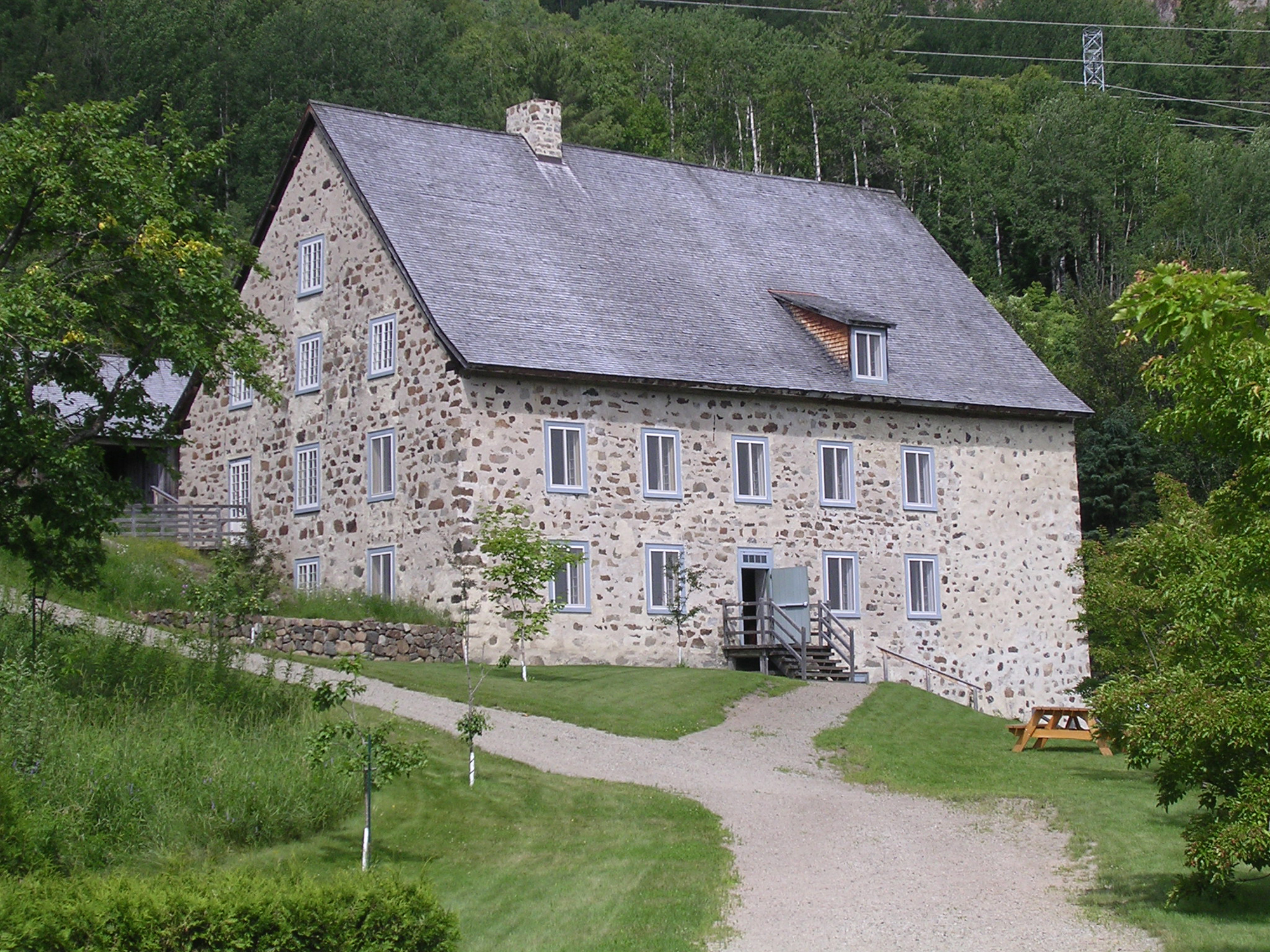 Moulin de la Rémy à Baie-Saint-Paul (Québec); moulin à eau; moulin à farine.